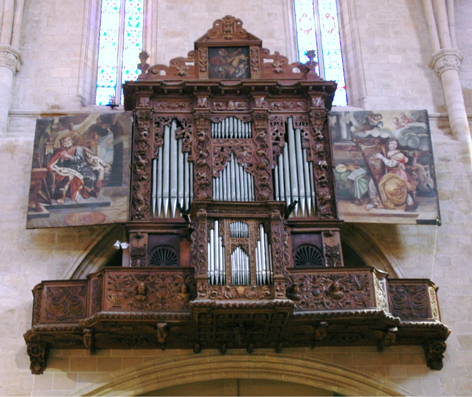 Orgue de Santa Maria la Major de Montblanc